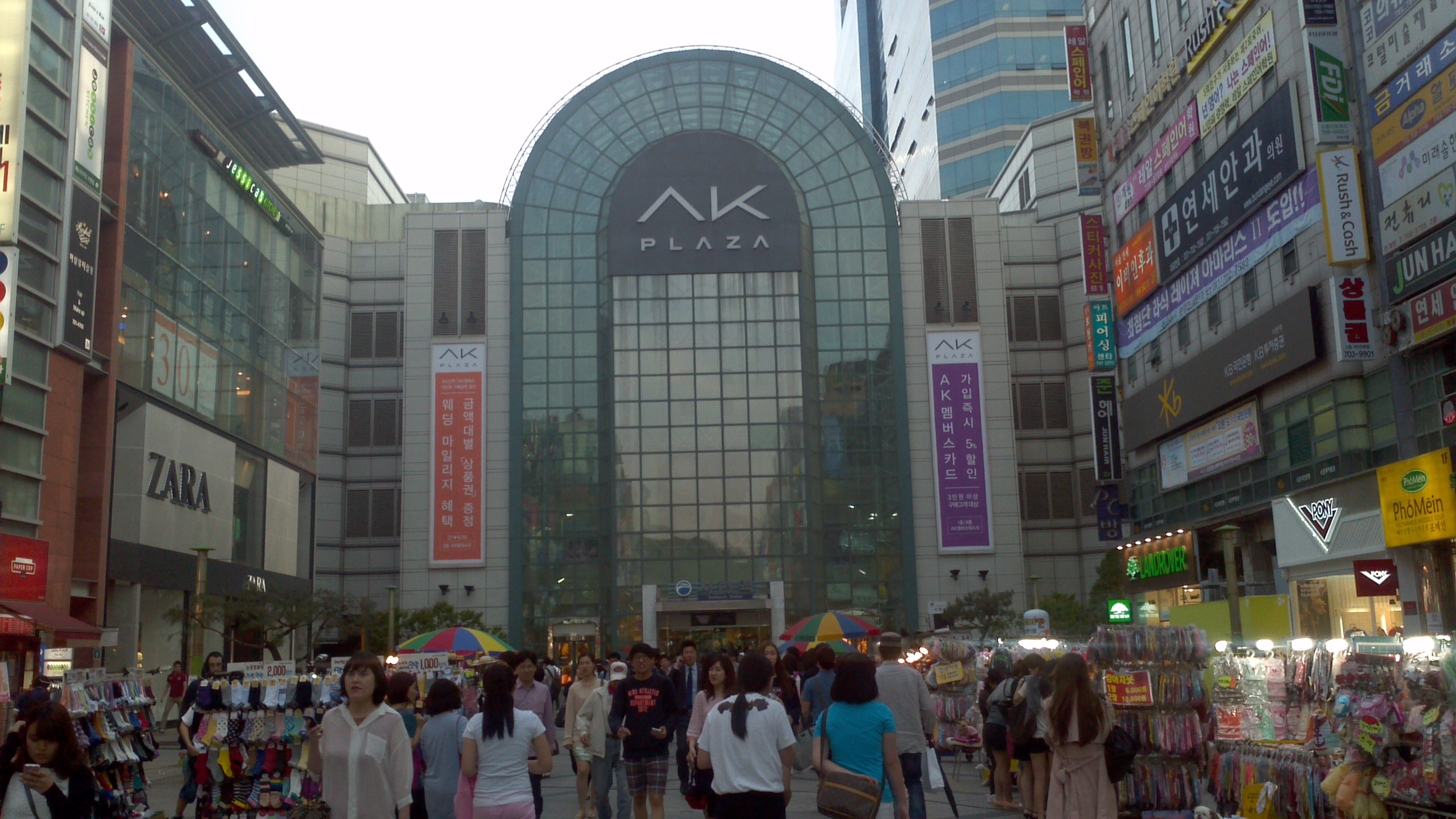 분당 AK플라자